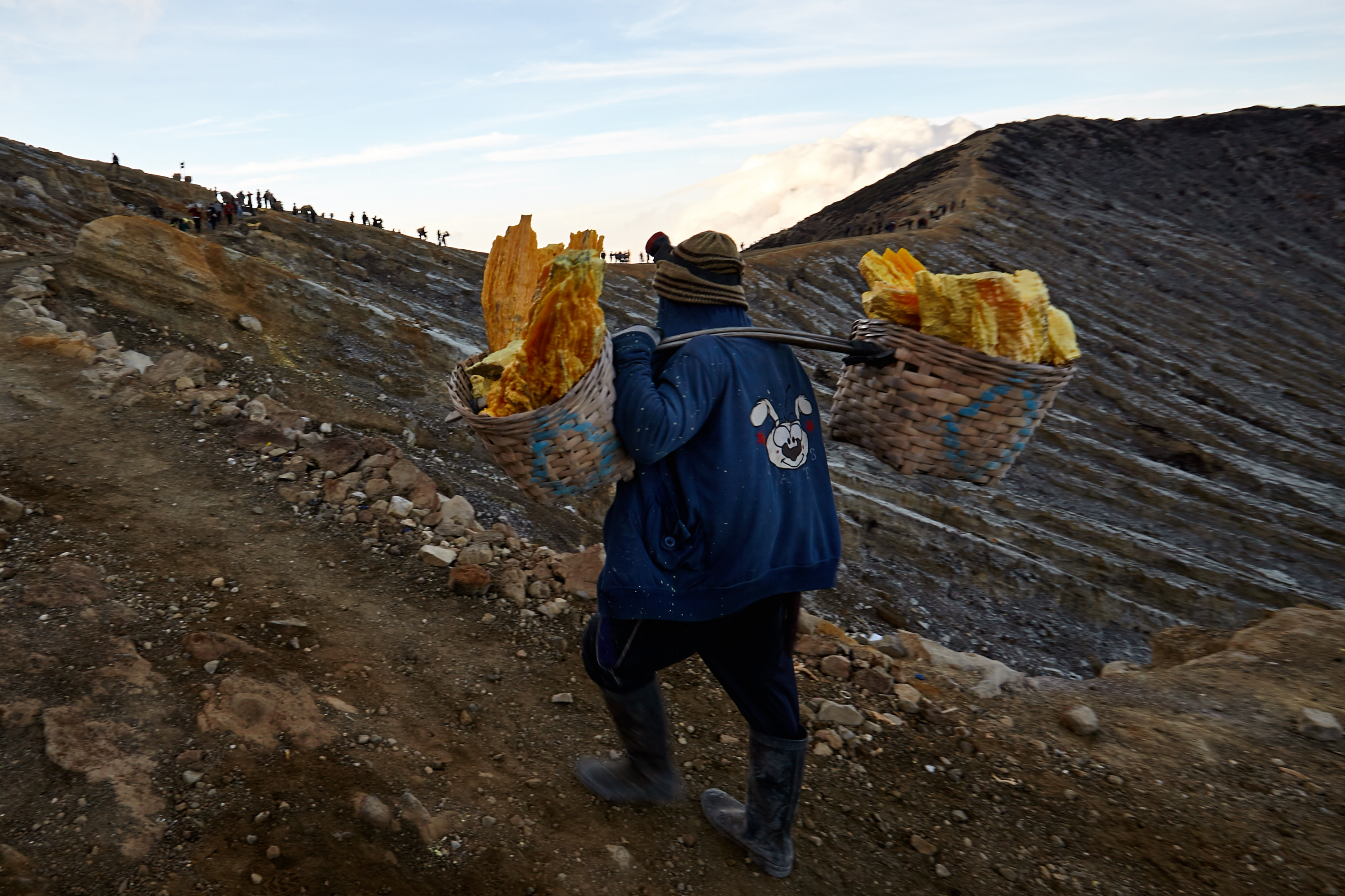 Penambang belerang tradisional di Gunung Ijen